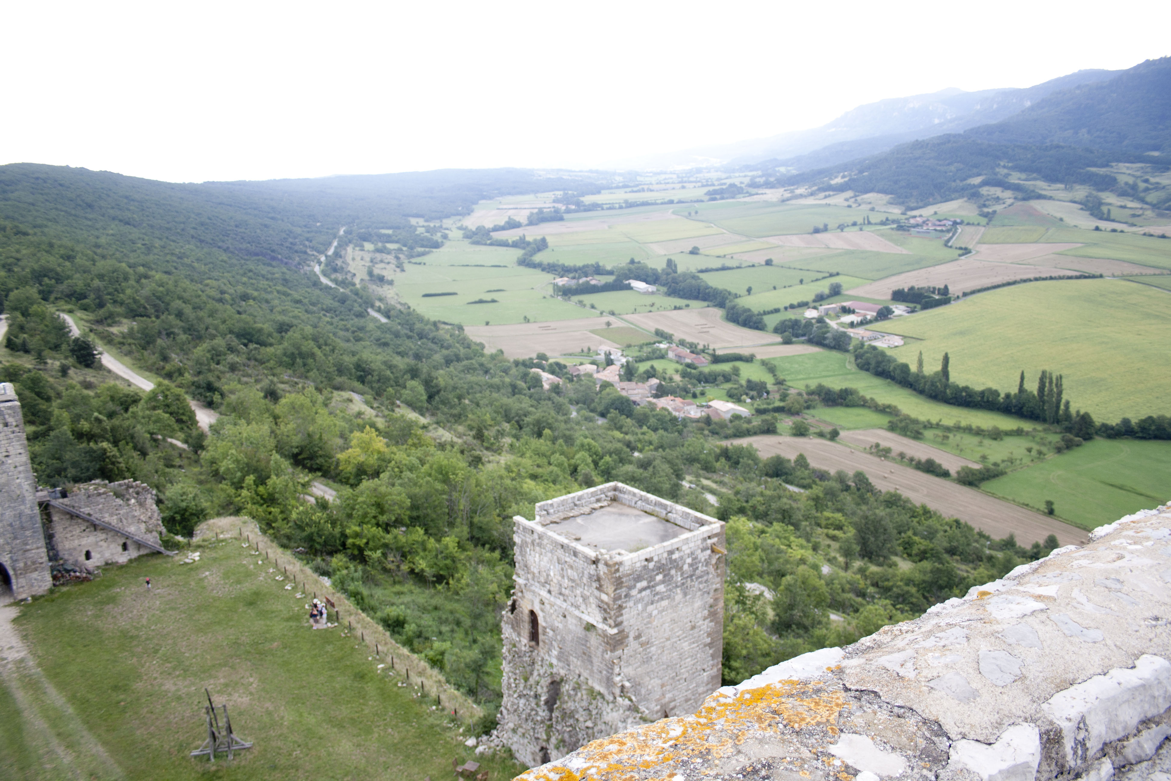 valley sight